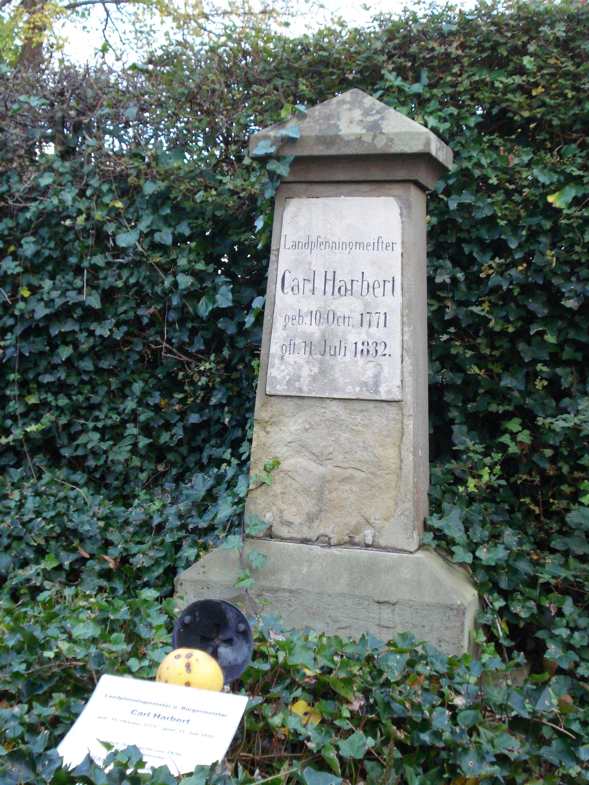 Grab von Carl Harbert auf dem Eichholzfriedhof in Arnsberg.